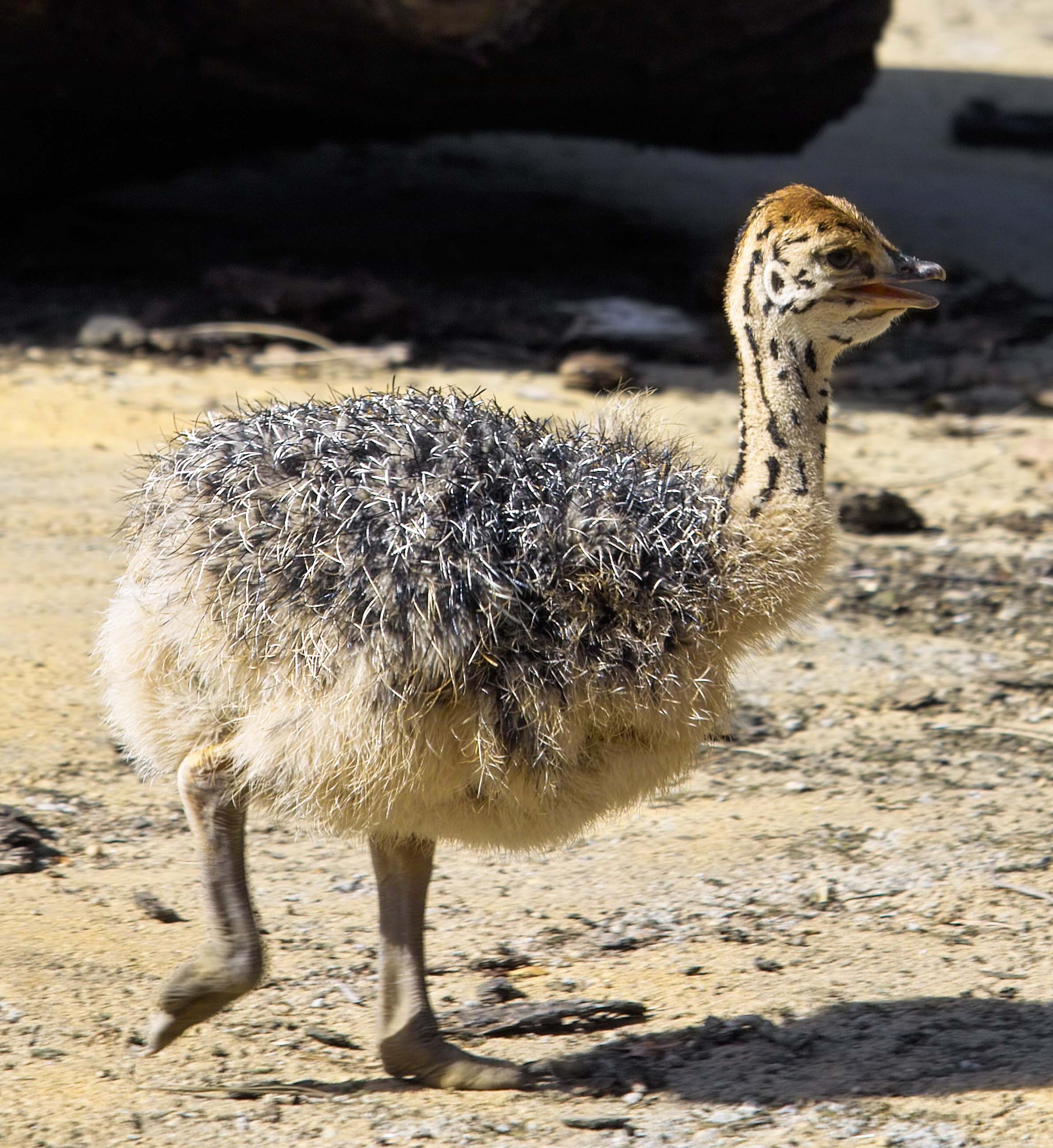 Afrikanischer Strauß (Struthio camelus), Küken